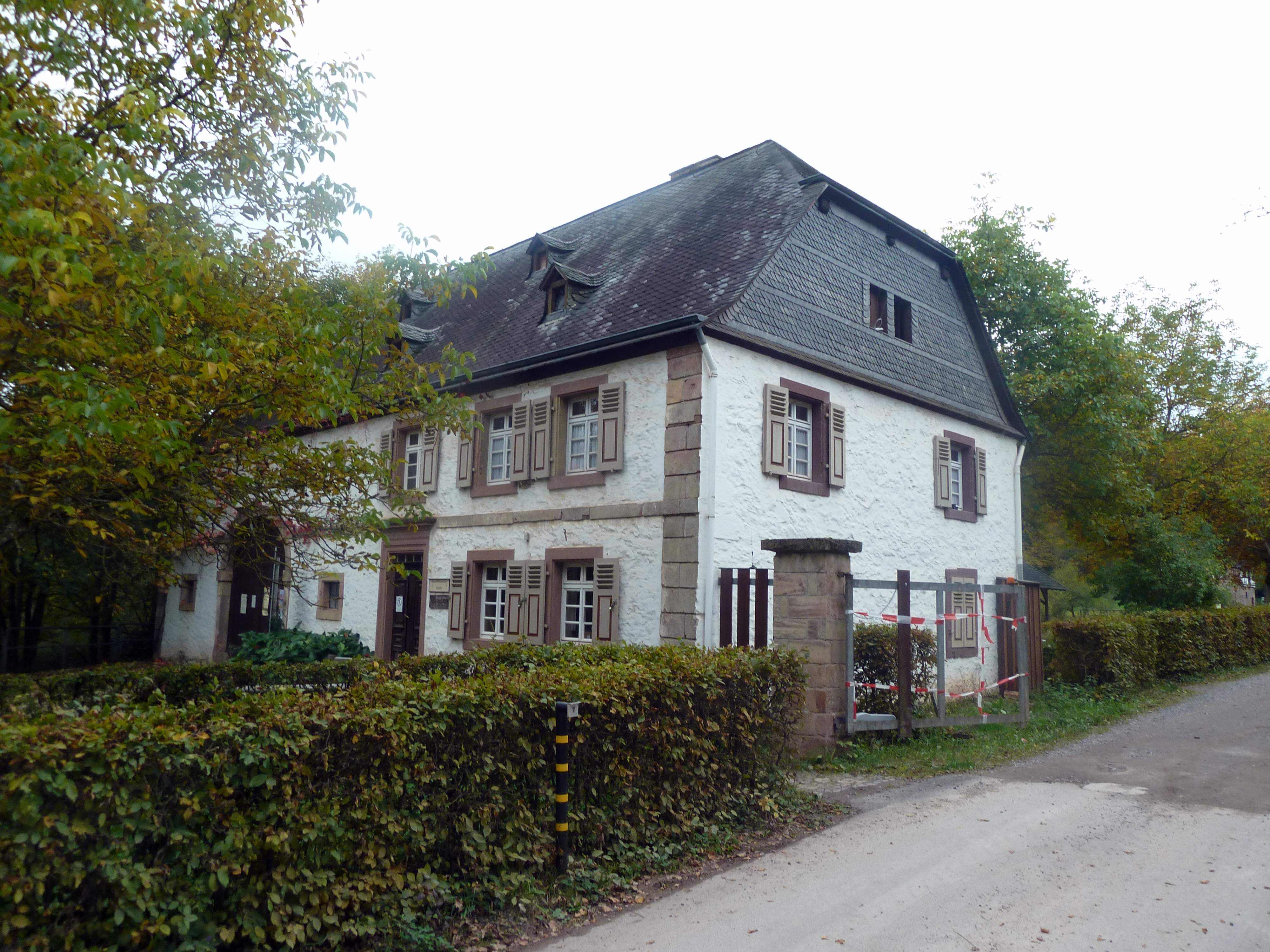 Rheinland-Pfälzisches FREILICHTMUSEUM Bad Sobernheim – Haus Wolfersweiler, Eingangsgebäude und Museumsladen